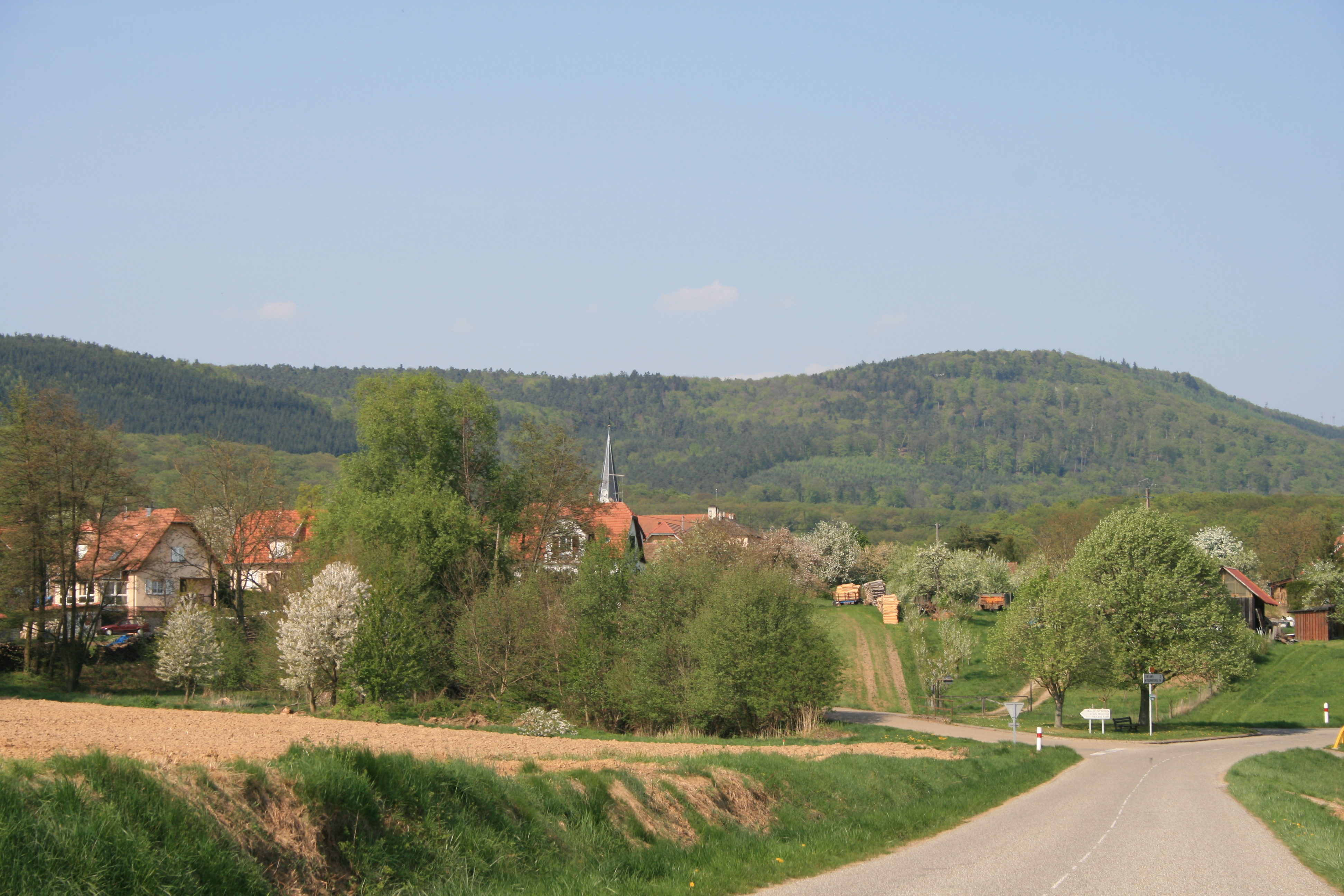 Lampertsloch, Alsace